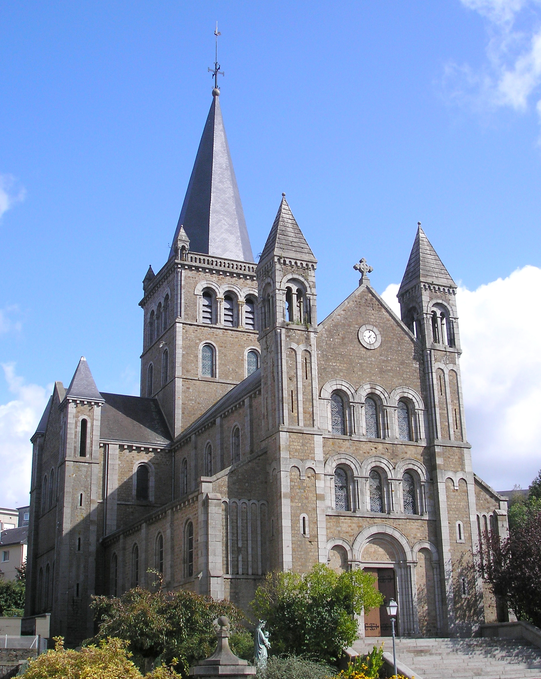 Vire (Normandie, France). L'église Sainte-Anne.